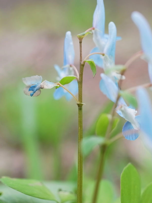 エゾエンゴサク。北海道にて。